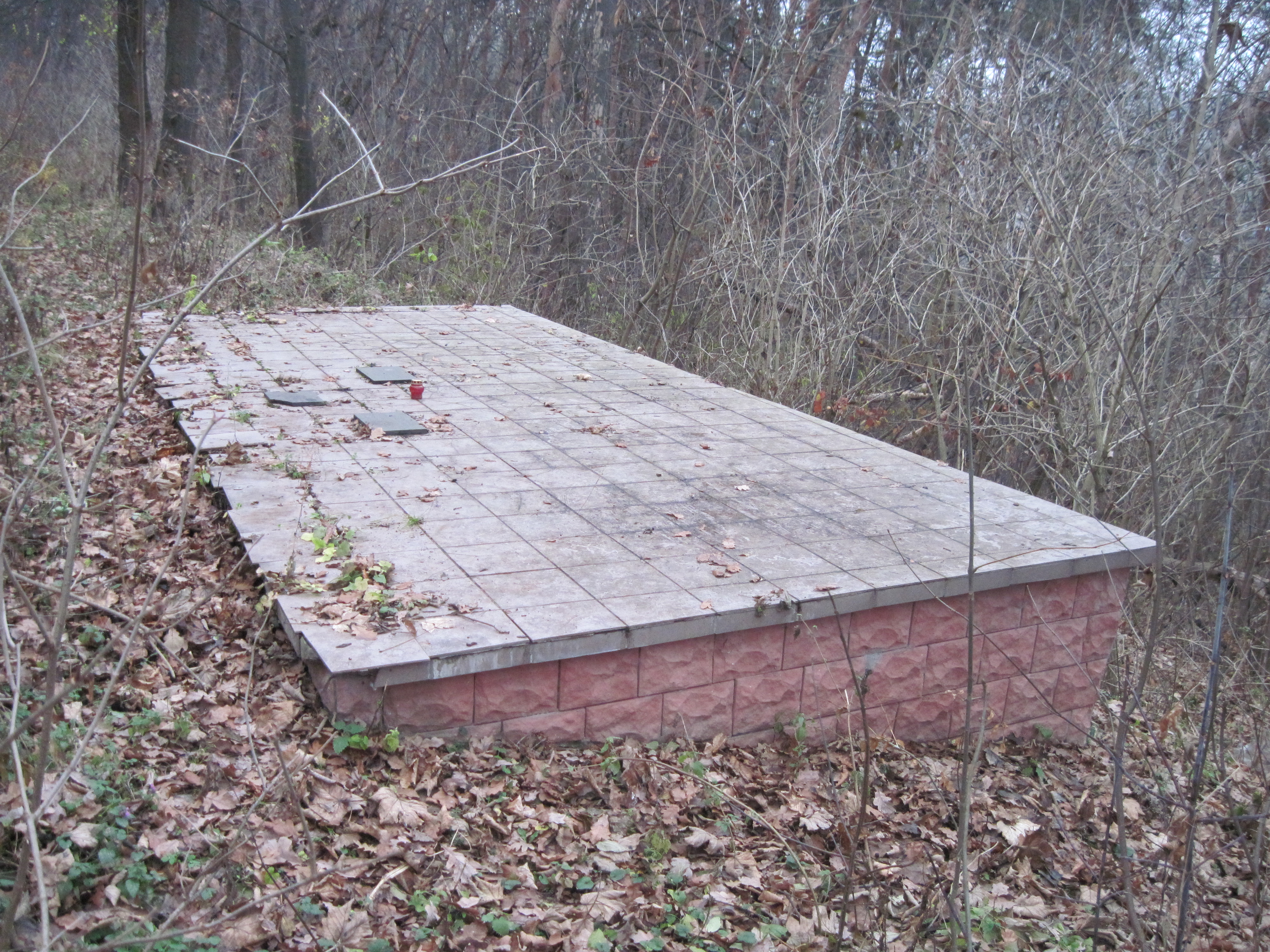 Меморіал вбитим гітлерівцями жидам в Бучачі (Башти, Торговиця) осінь 2014